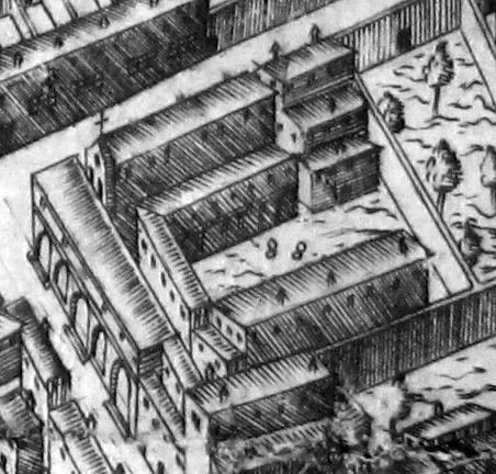 Pianta del buonsignori, dettaglio 088 san matteo monastero (accademia)